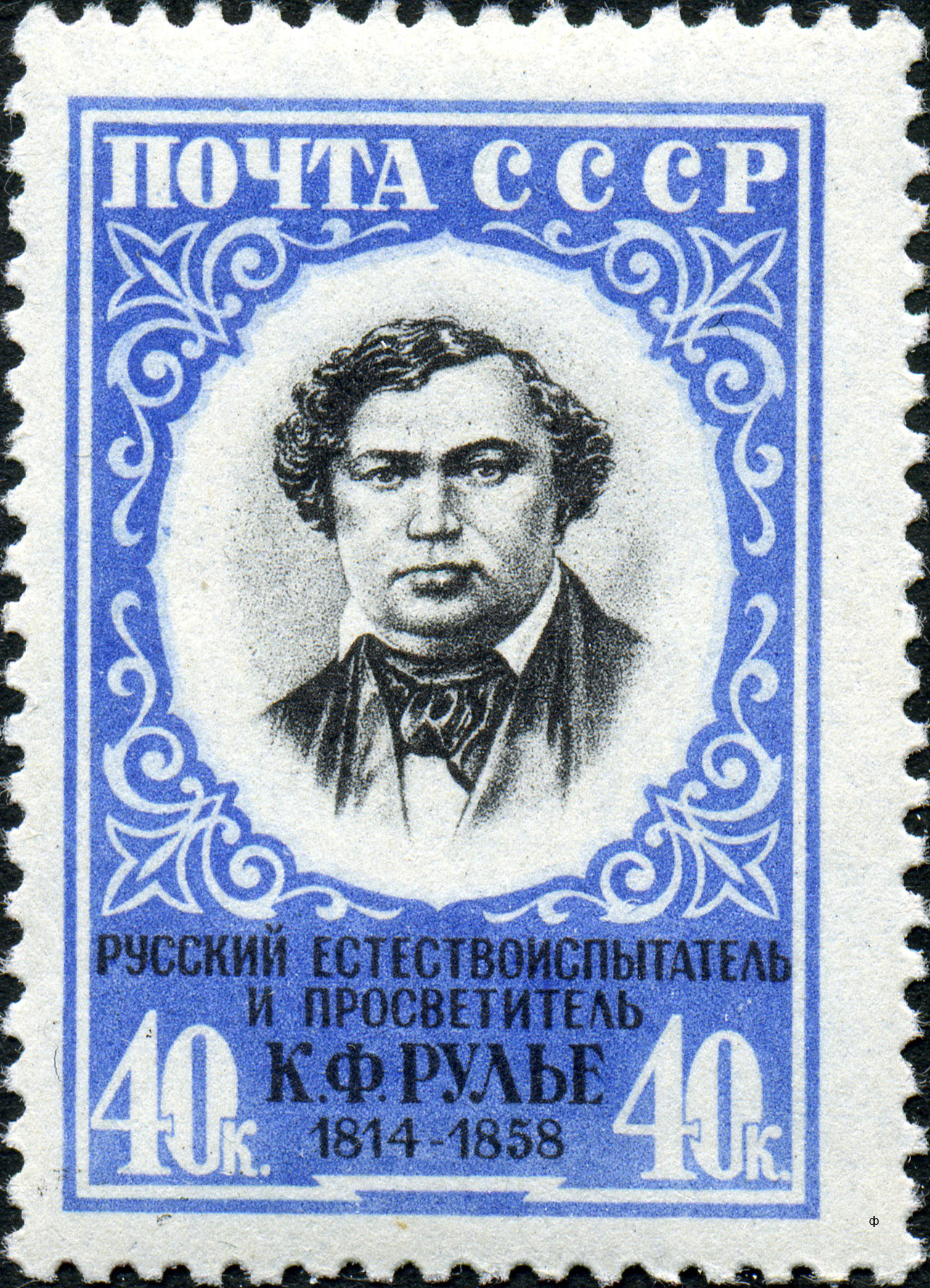 Марка СССР